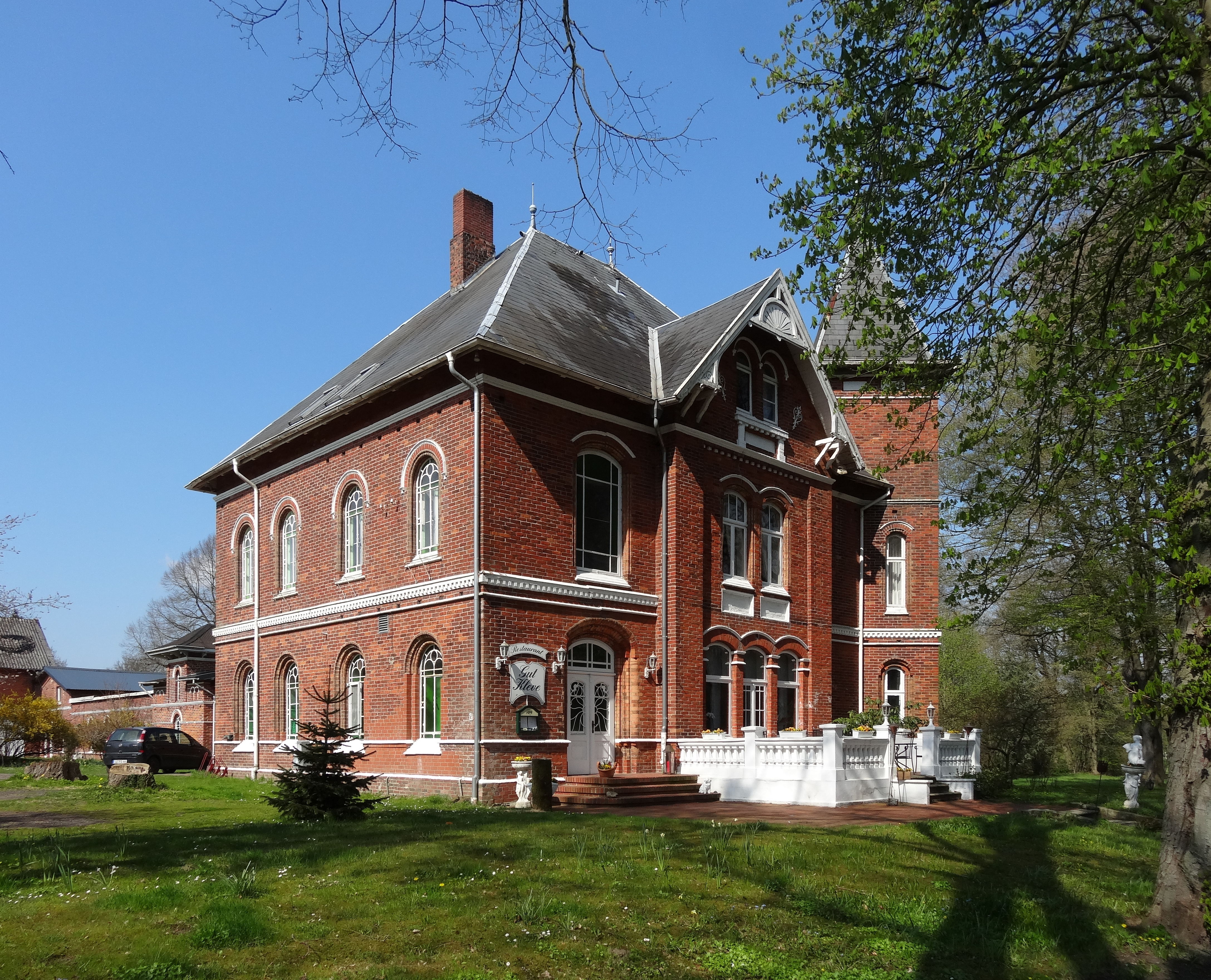 Das ehemalige Gut Kleve, heute ein Hotel.